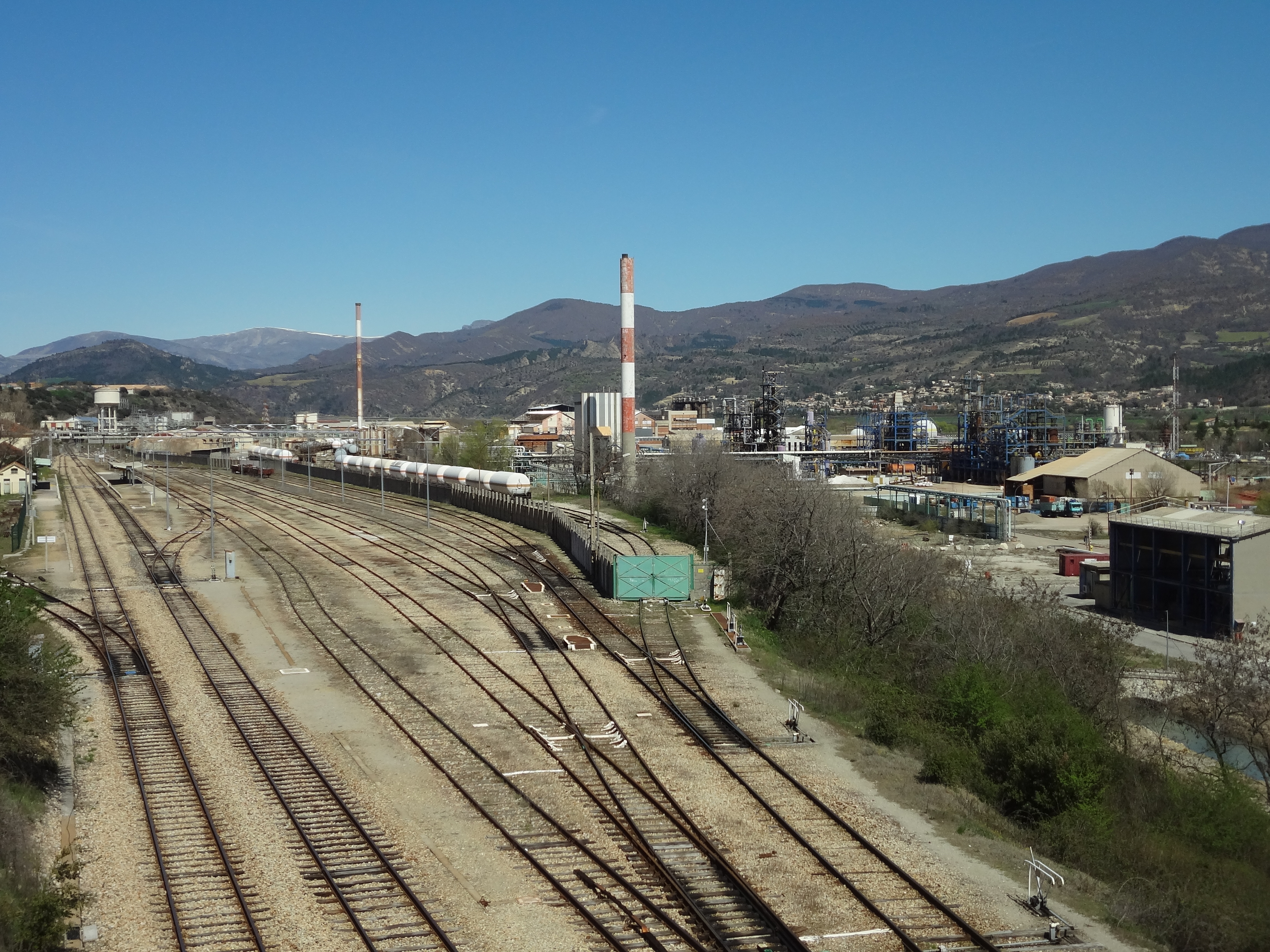 L’usine est construite en 1916 pour la fabrication de chlore pour les armes chimiques de la Première Guerre mondiale. Elle a appartenu à Alais, Froges et Camargue, puis Péchiney Saint-Gobain, Rhône-Poulenc, Elf Atochem (1992), Atofina, Arkema (2004). Elle fabrique actuellement du PVC. Photo prise du bord du portique SNCF.